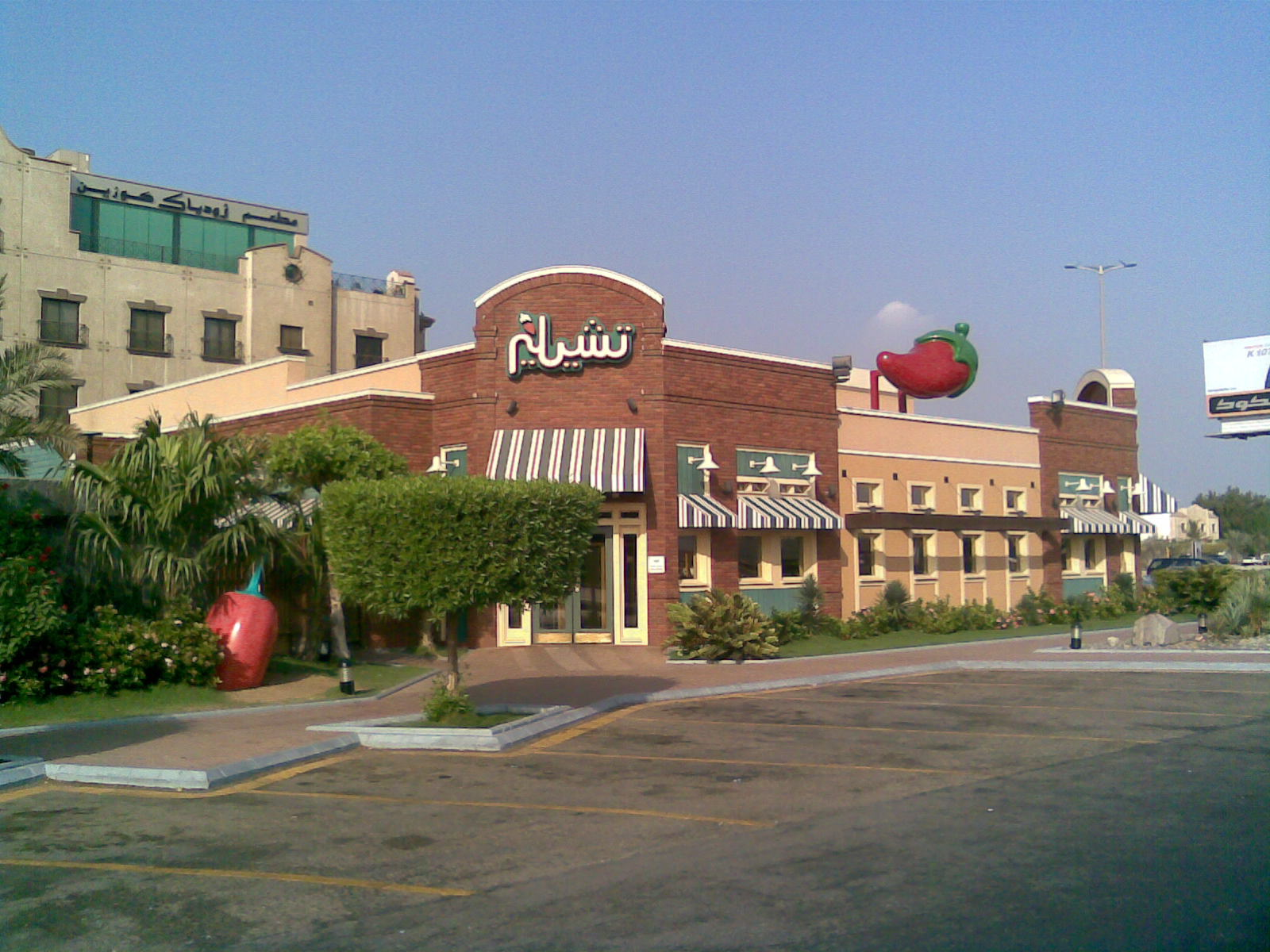 ജിദ്ദയിലെ ചിലീസ്‌ ഹോട്ടൽ